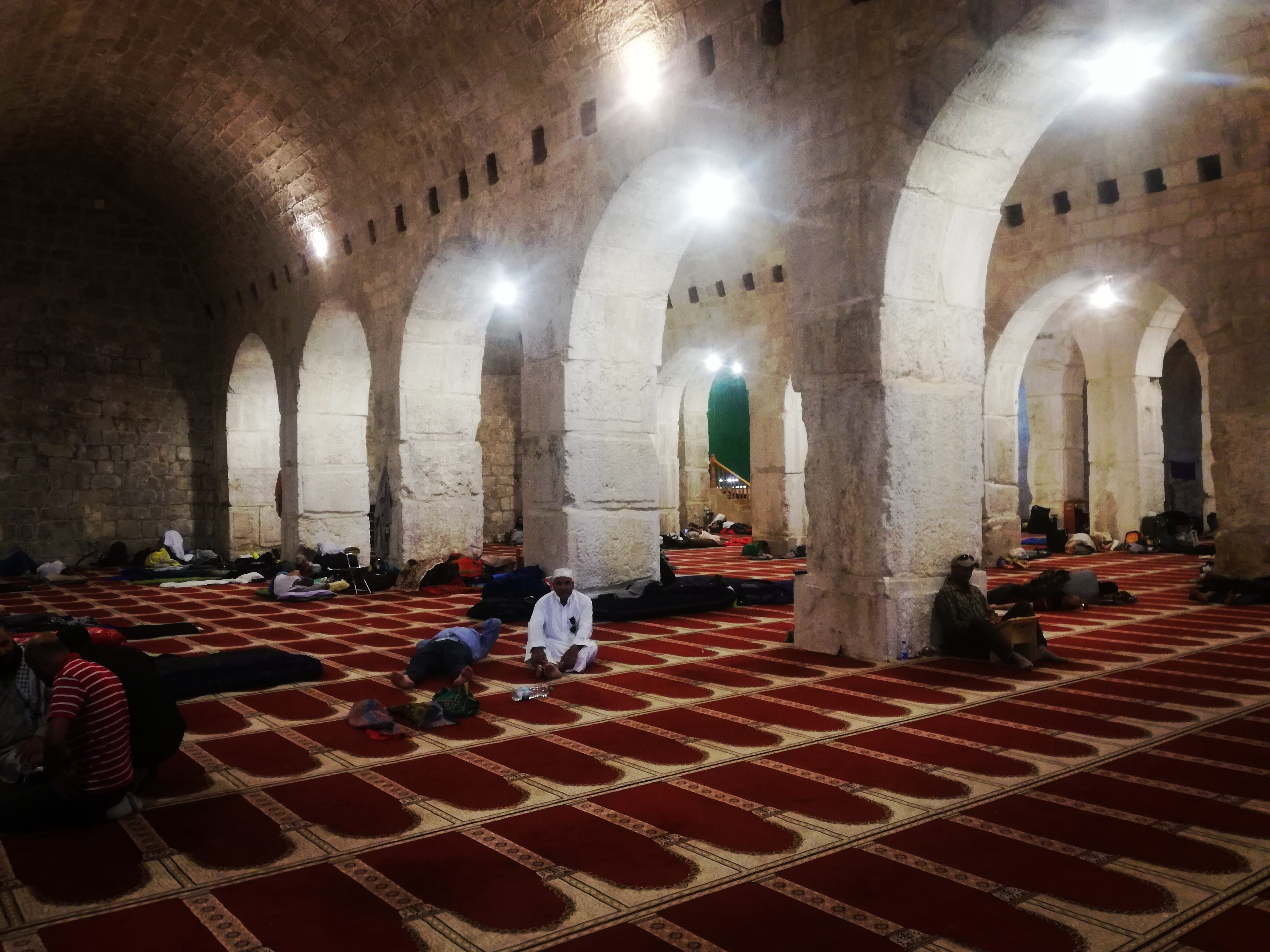 من داخل المصلى المرواني